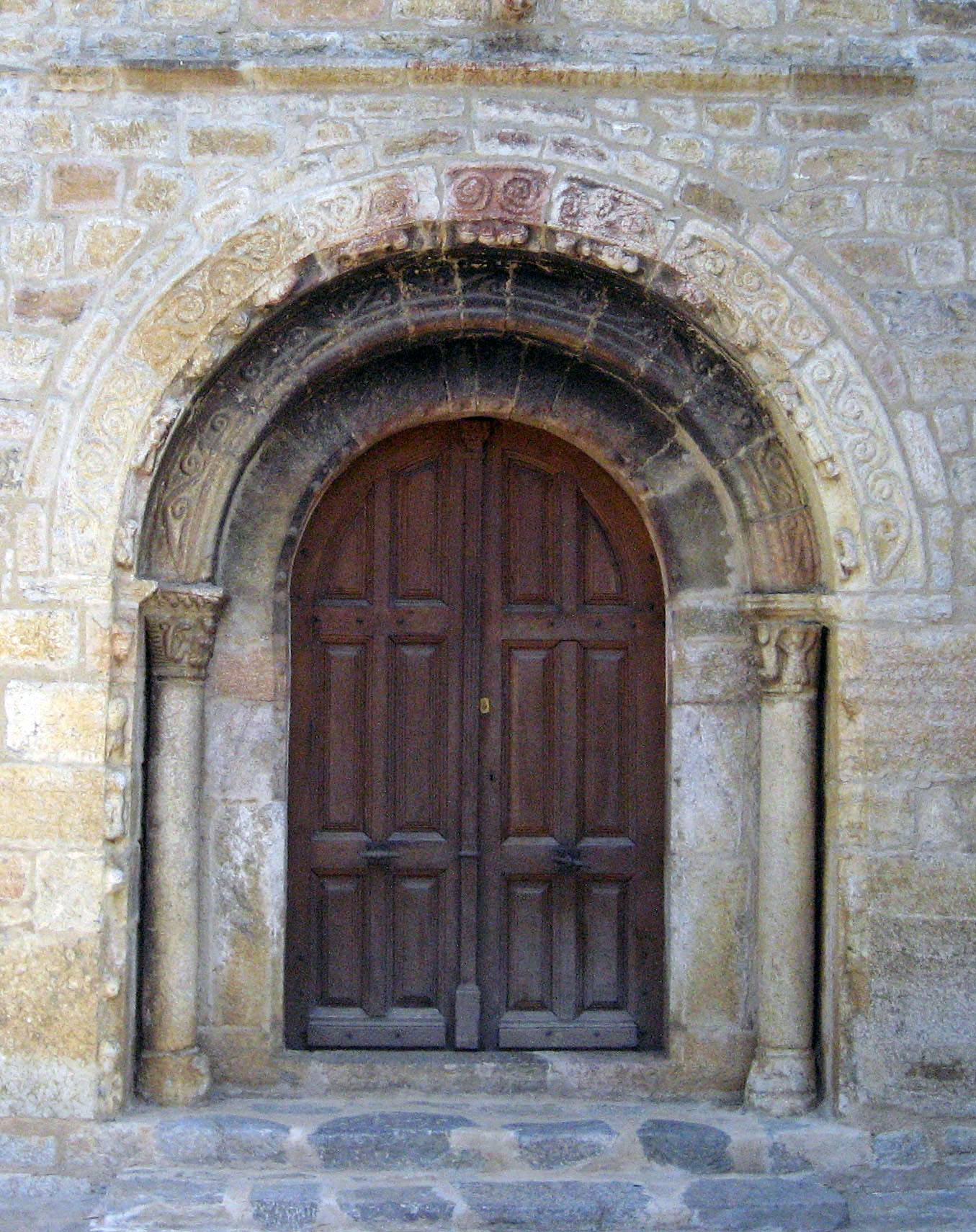 Puerta de Santa María de All en la Baja Cerdaña (Cataluña) España